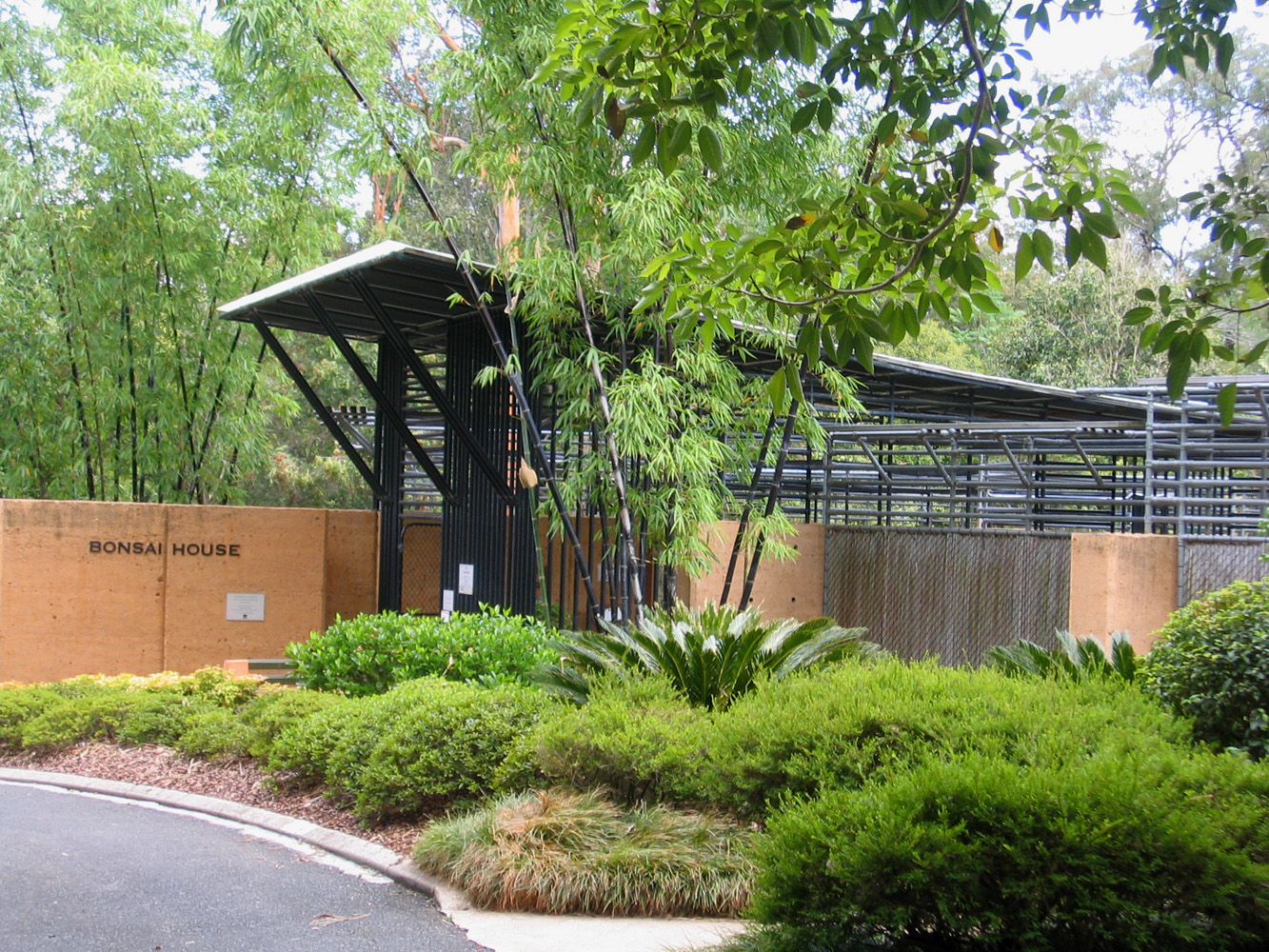 Bonsai House Bonsai House